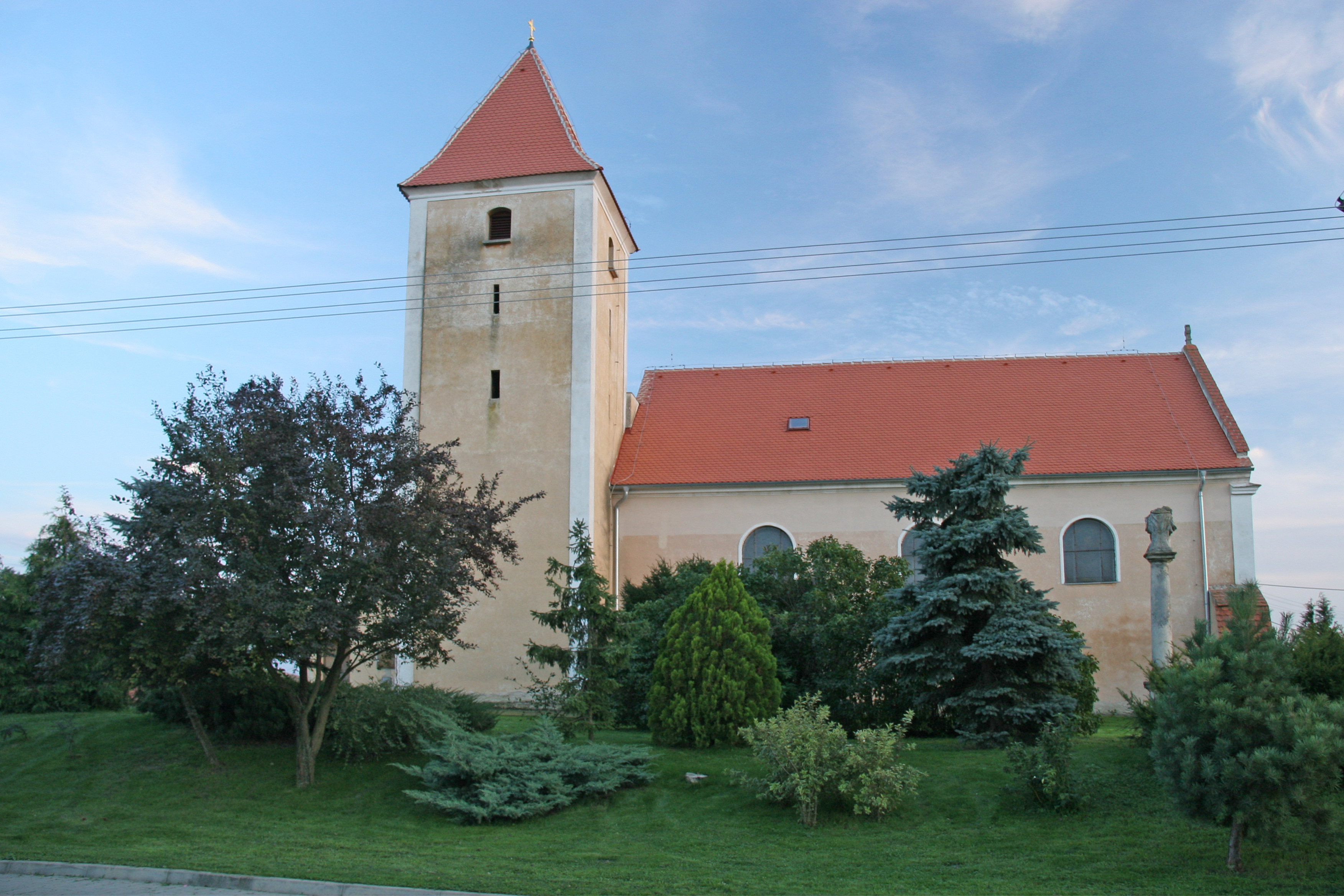 Kostel svatého Víta, Dyjákovičky.